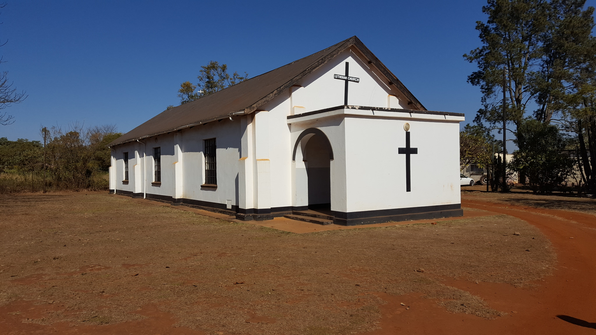 Foto van kerkgebou van voormalige GK Goedgegun, tans 'n Lutherse Kerk